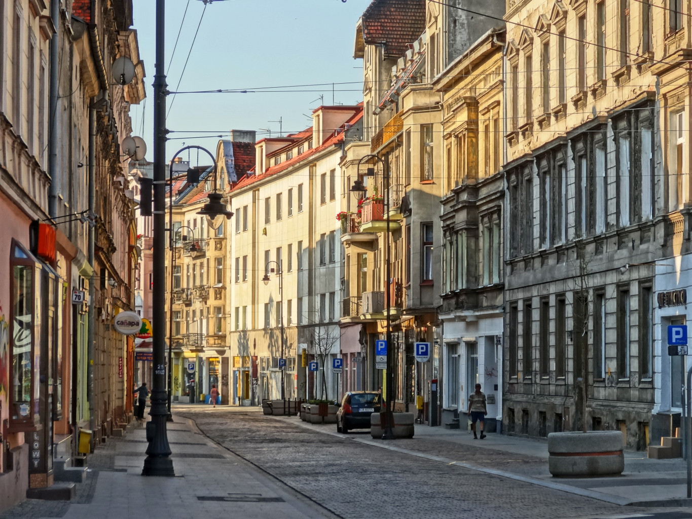 Ulica Dworcowa w Bydgoszczy na odcinku od ul. Marcinkowskiego do ul. Królowej Jadwigi